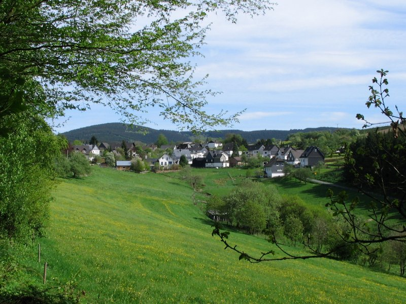 Schwartmecke in der Gemeinde Kirchhundem, NRW, Deutschland